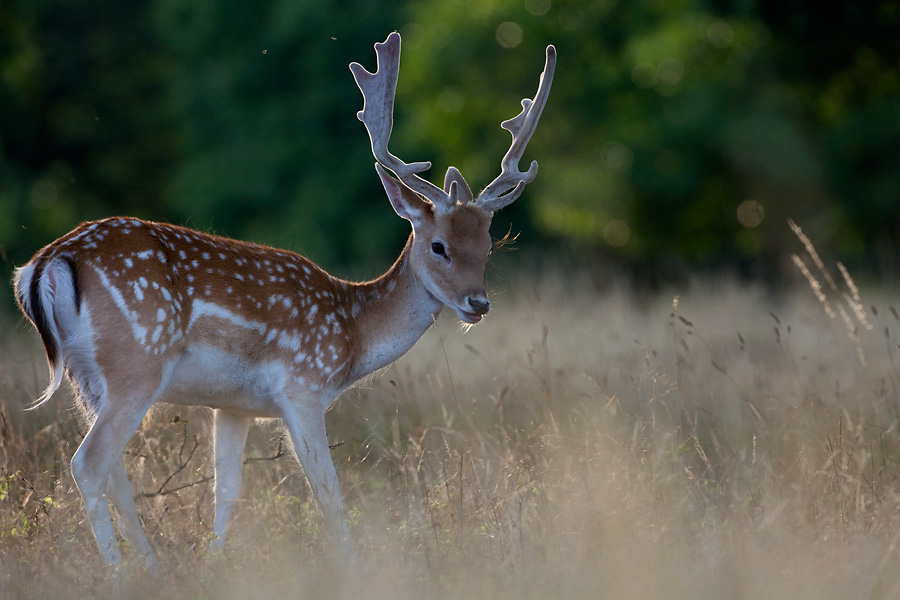 Dama dama